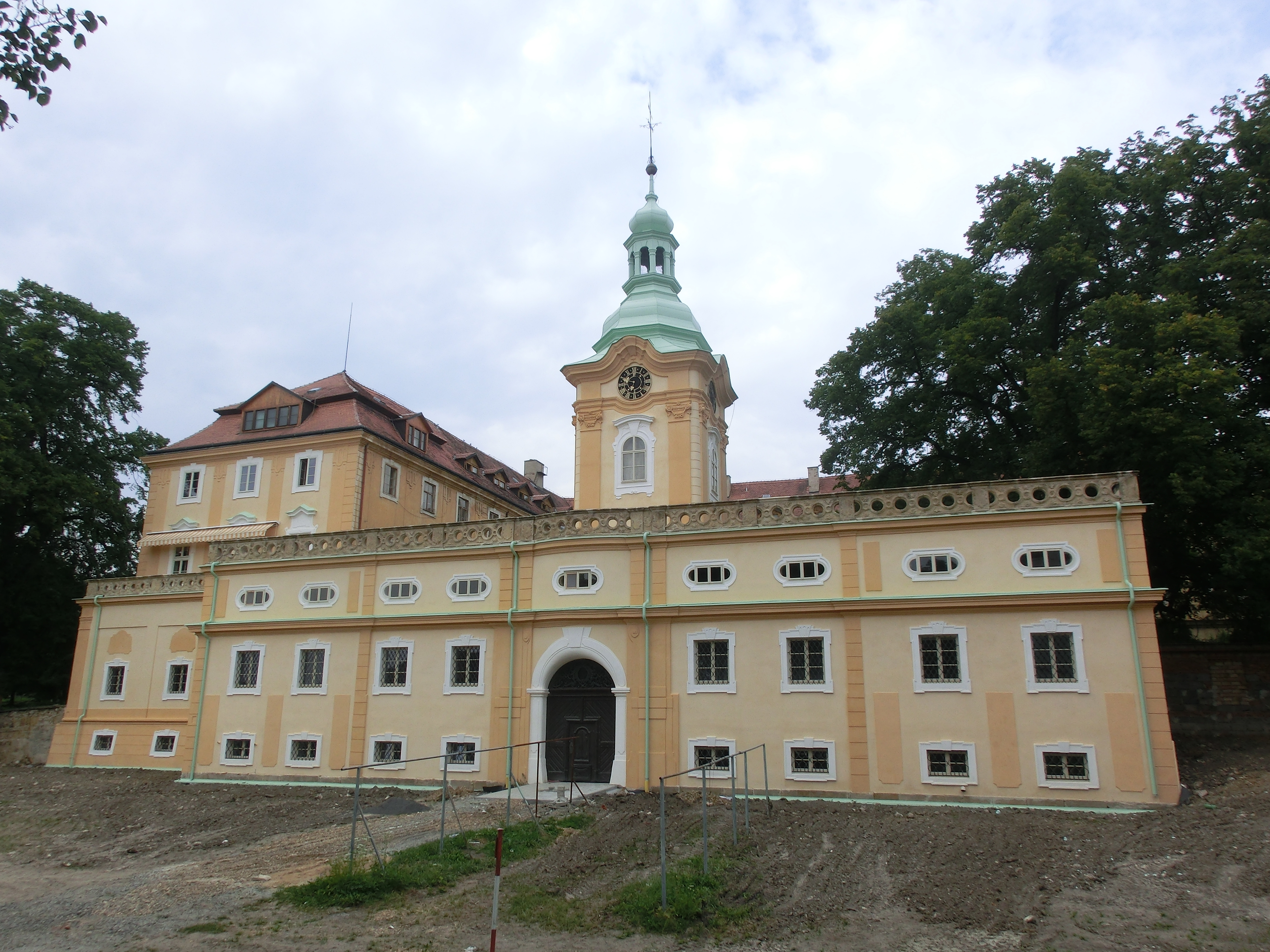 Zámek Liběšice dne 28. července 2012